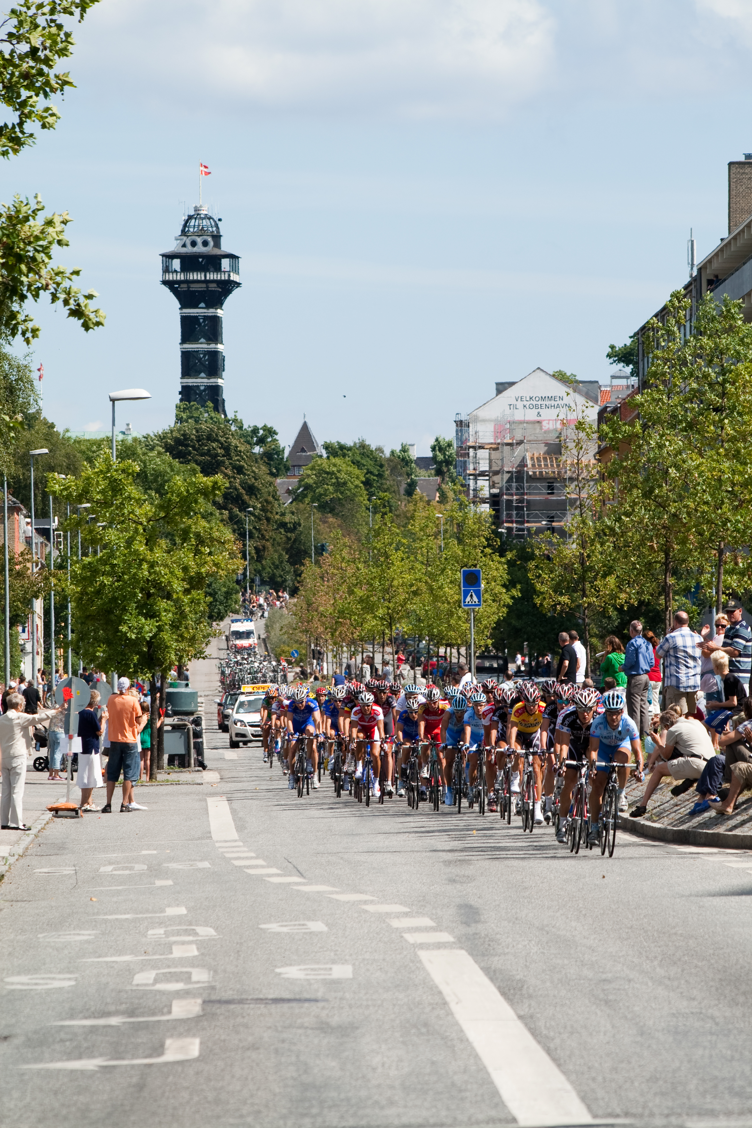 Post Danmark Rundt 2008 at Roskildevej in Copenhagen, Denmark